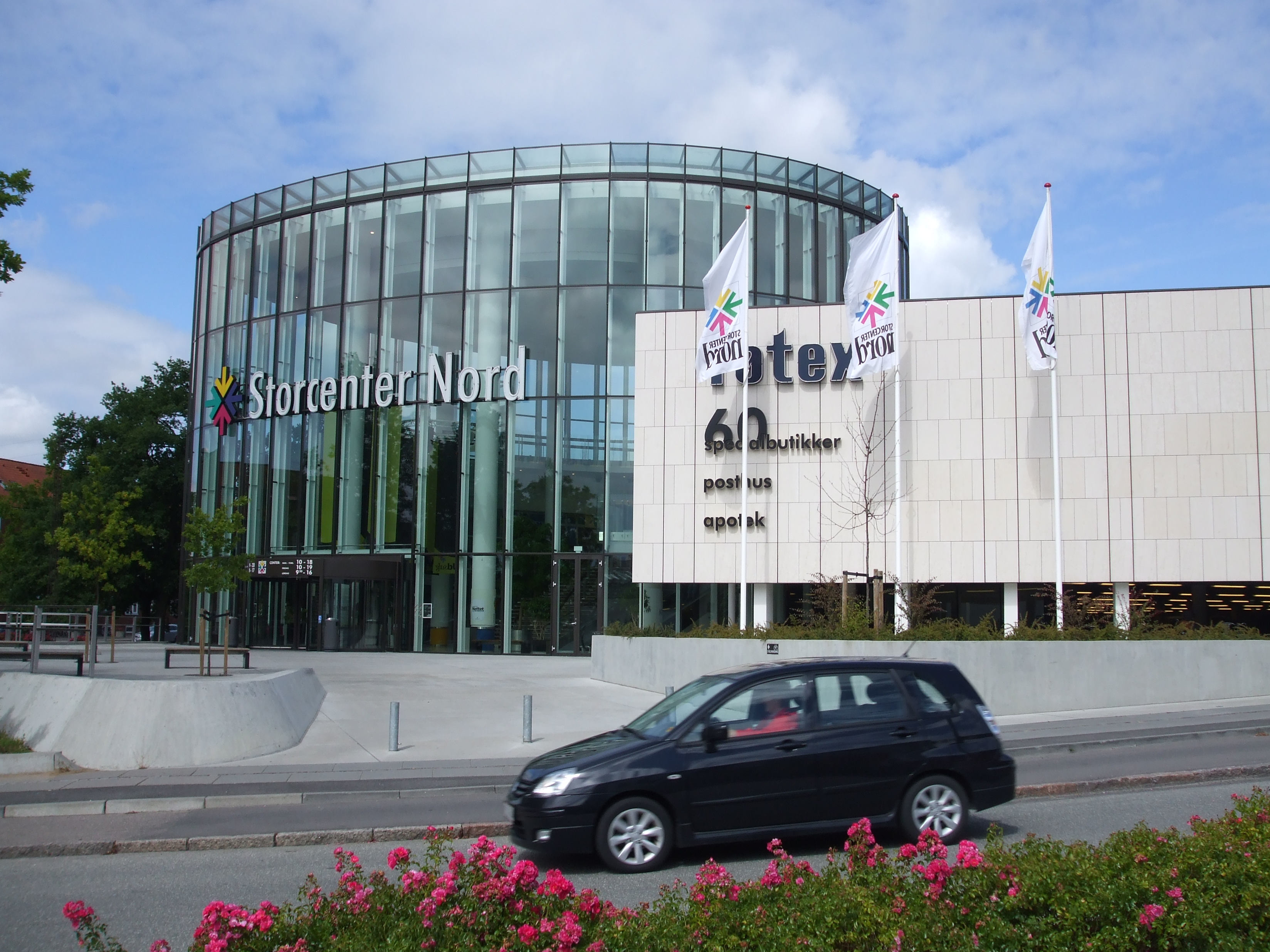 Billedet er af Storcenter Nord på Christiansbjergs nye facade